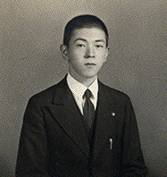 鬼頭恭一の肖像